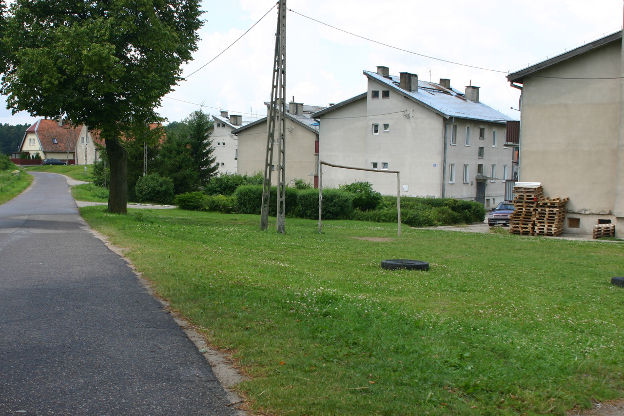 Szczeciniak, Polska, powiat kętrzyński.